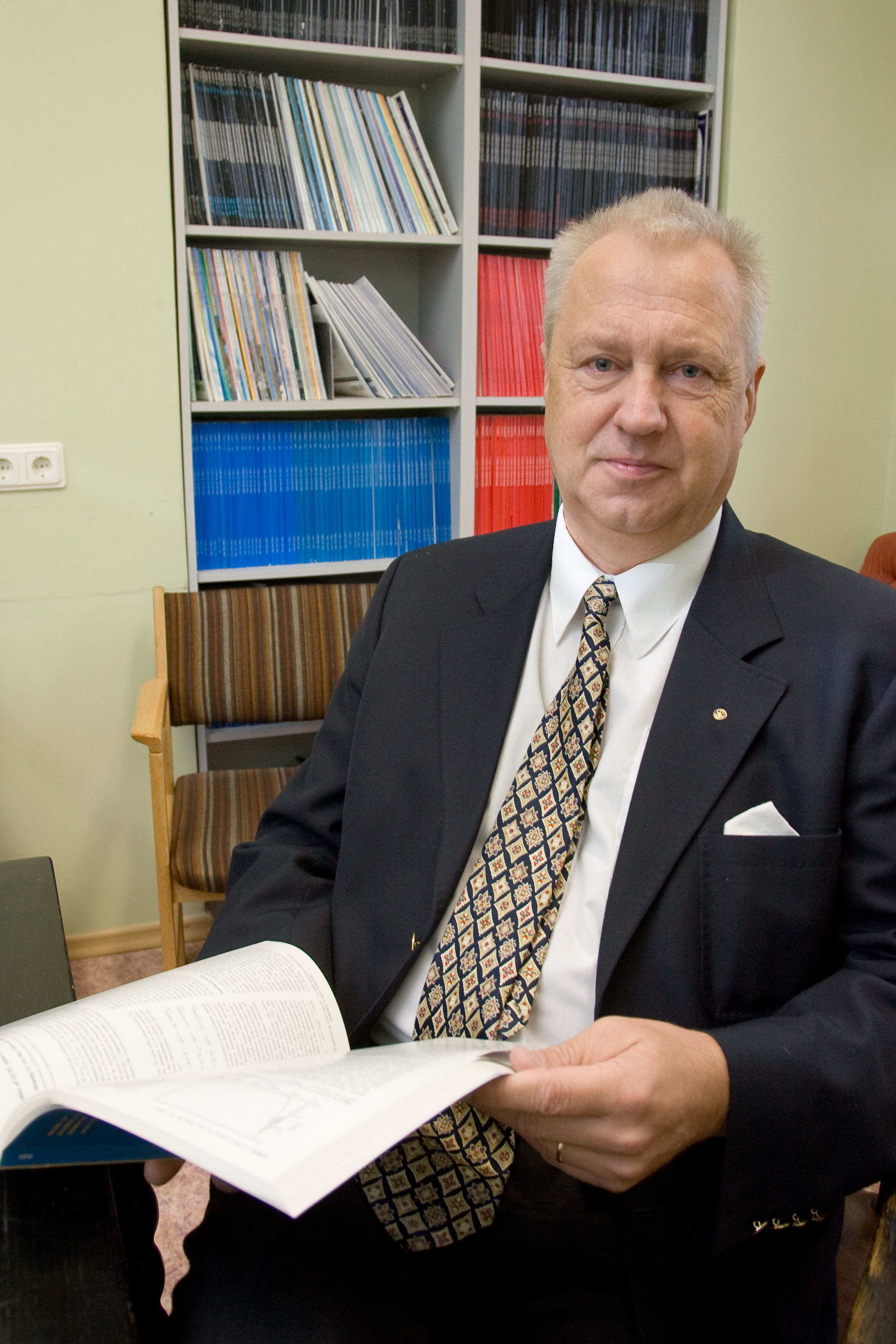 Tartu Ülikooli Keemia Instituudi orgaanilise keemia õppetooli orgaanilise keemia professor Jaak Järv. Foto raamatusse "TARTU ÜLIKOOLI KEEMIAOSAKOND 1947 - 2007".